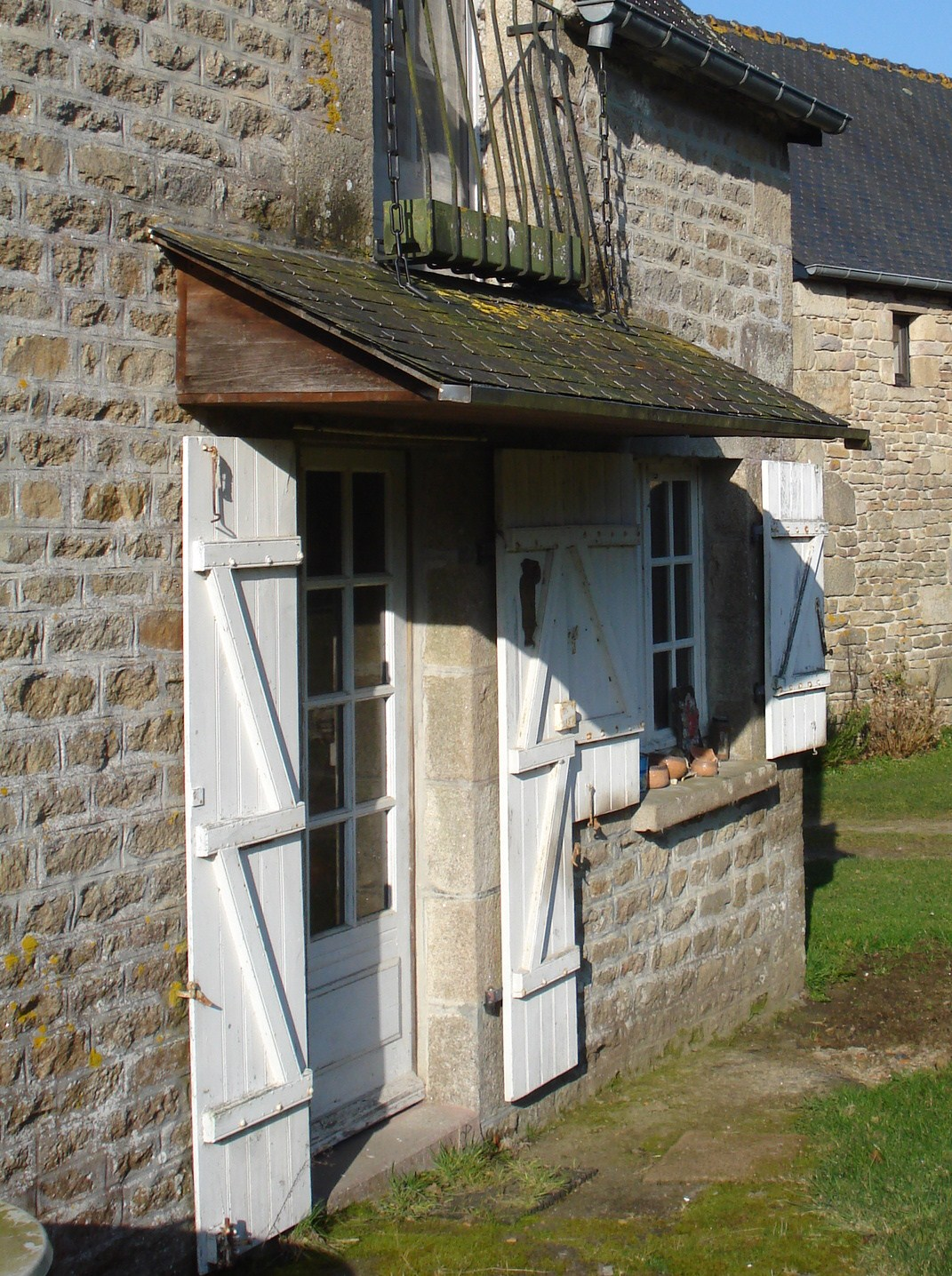 Alero super pordo cxe bretona dometo en La Ville Heleuc, Plélan-le-Petit.